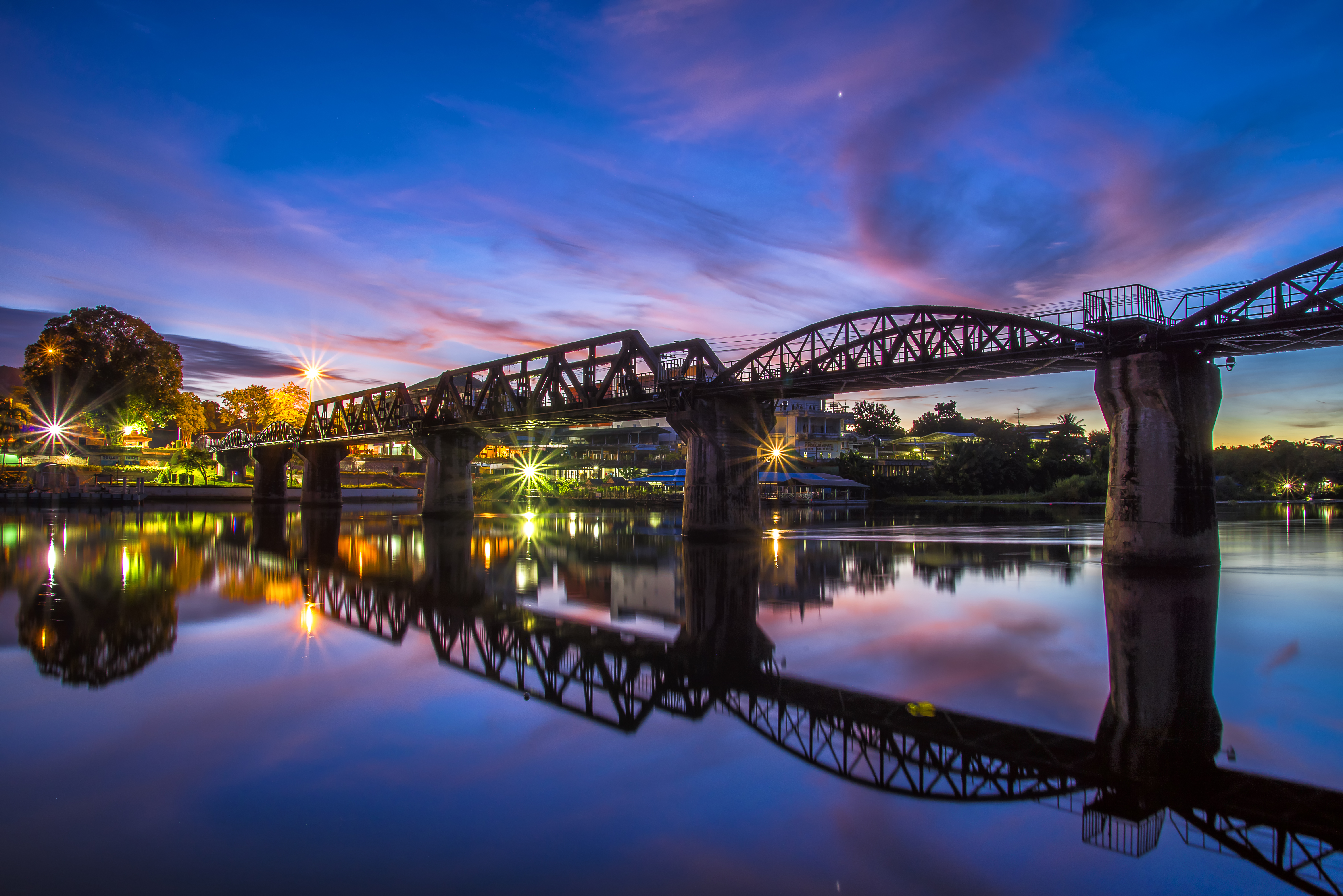 สะพานข้ามแม่น้ำแคว